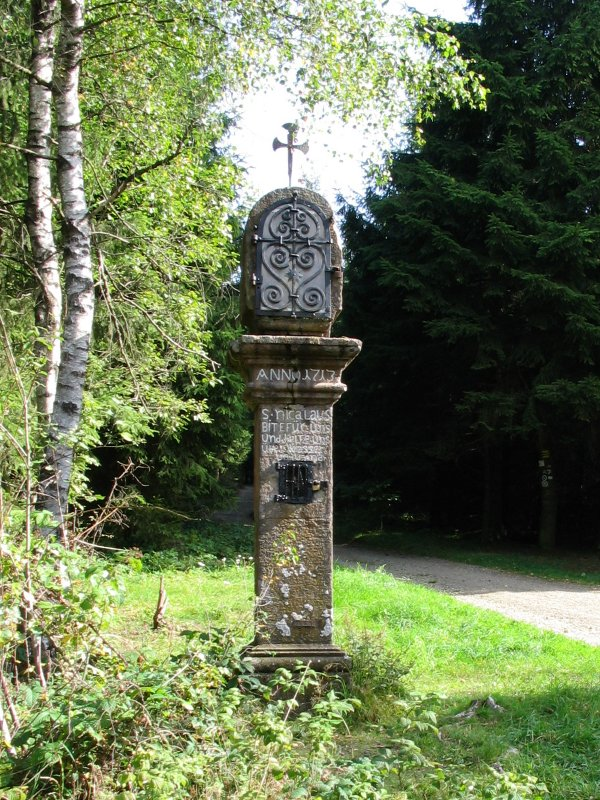 Das Steinerne Kreuz bei Selbecke in der Gemeinde Kirchhundem, NRW, Deutschland